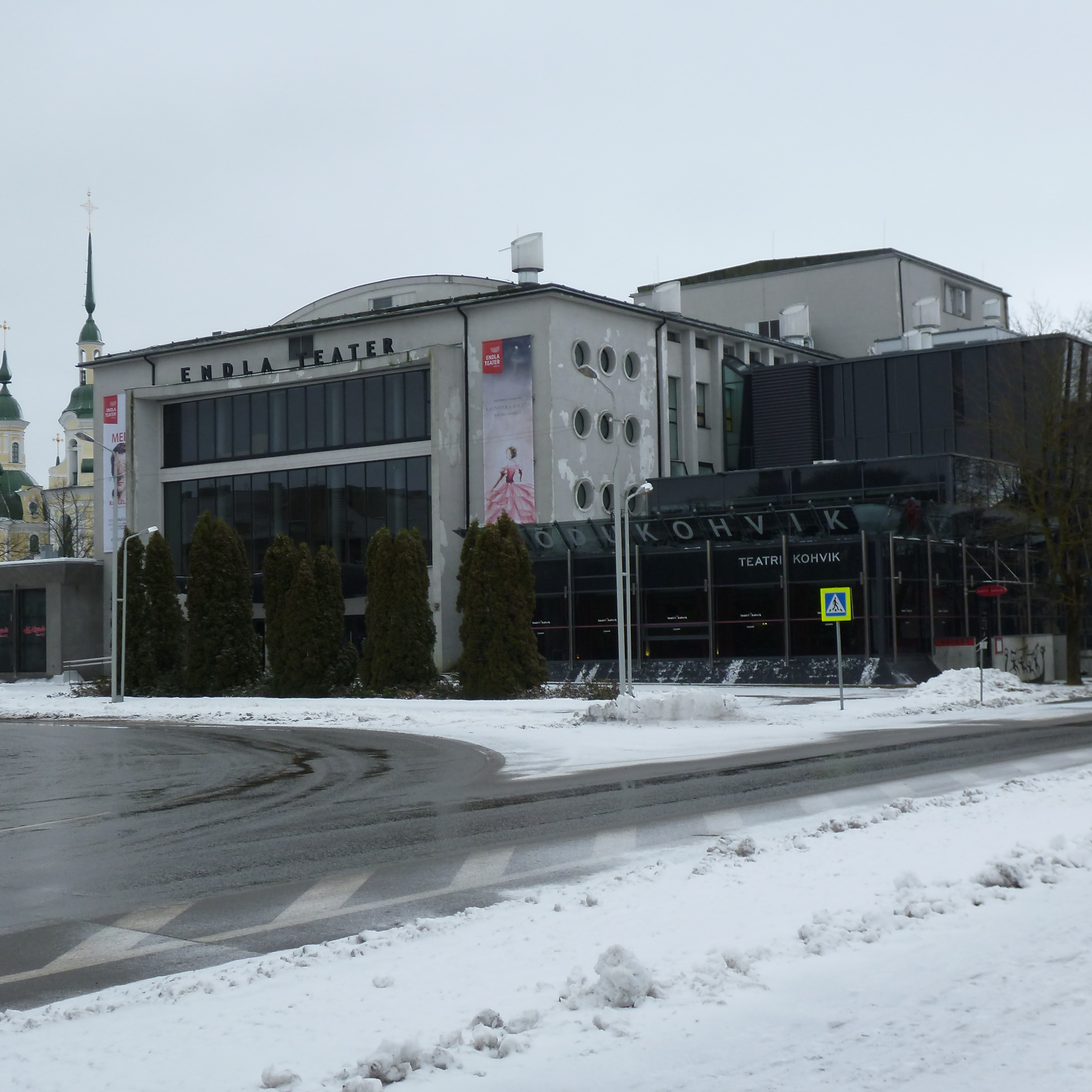 Teatteri Endla Pärnussa